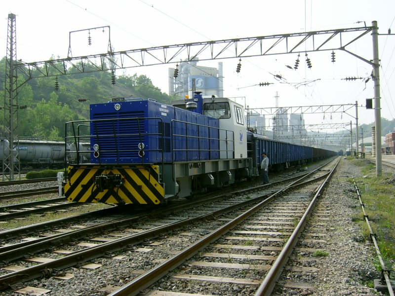 Rangierlokomotive für ein Zementwerk in Süd-Korea